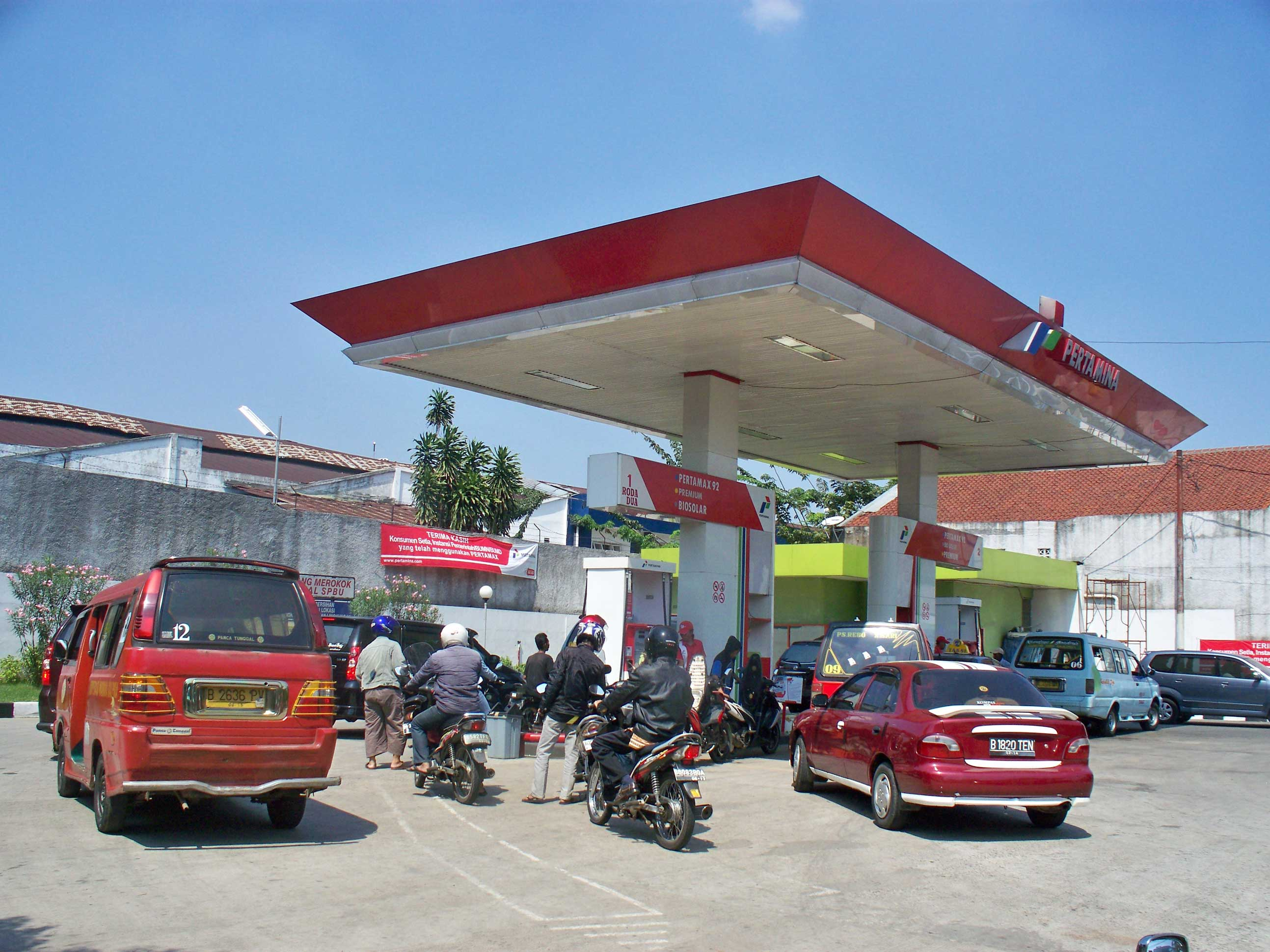 SPBU 34-13704